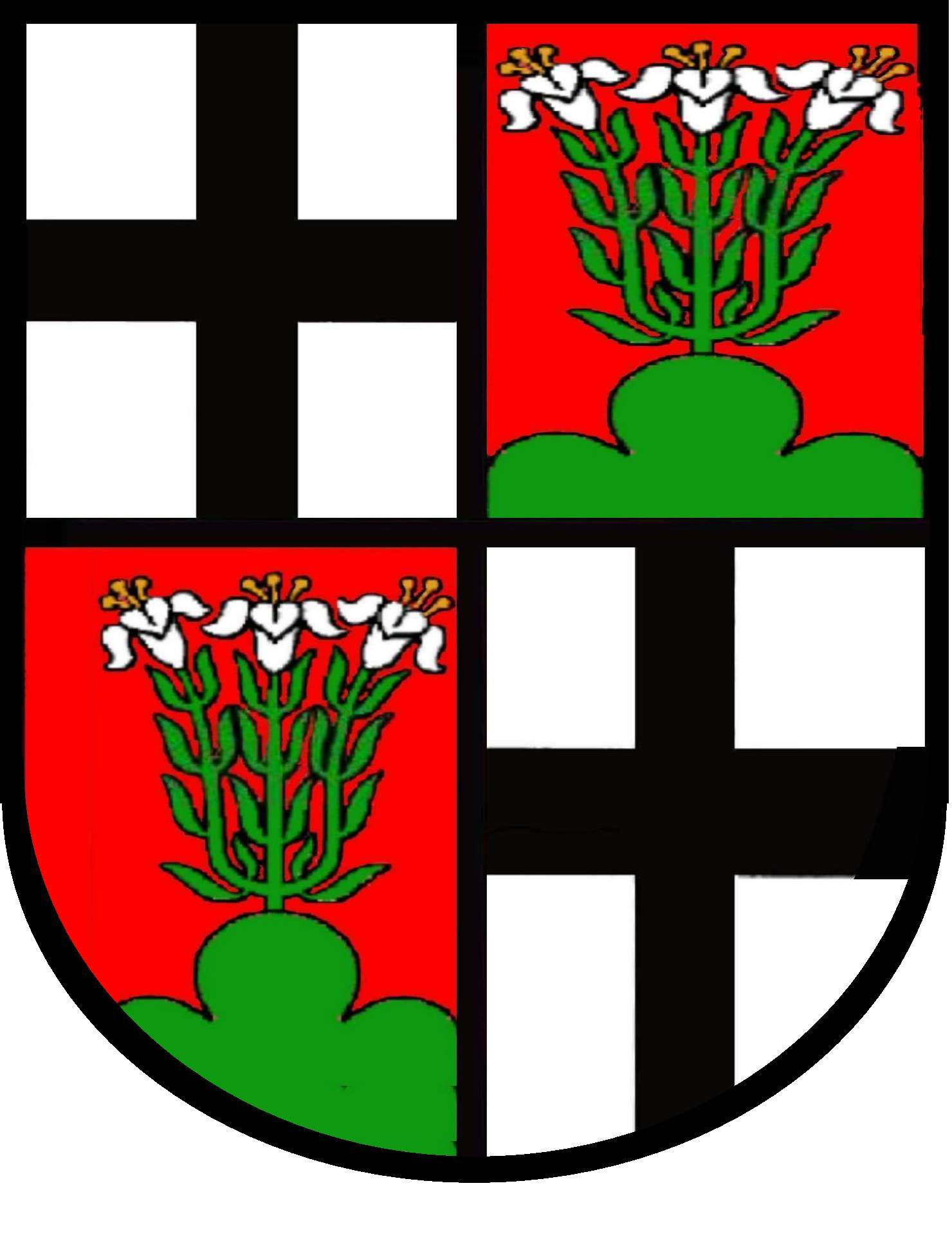 Bischofswappen Fulda 1853 bis 1894 (teils gespalten, teils geviert)